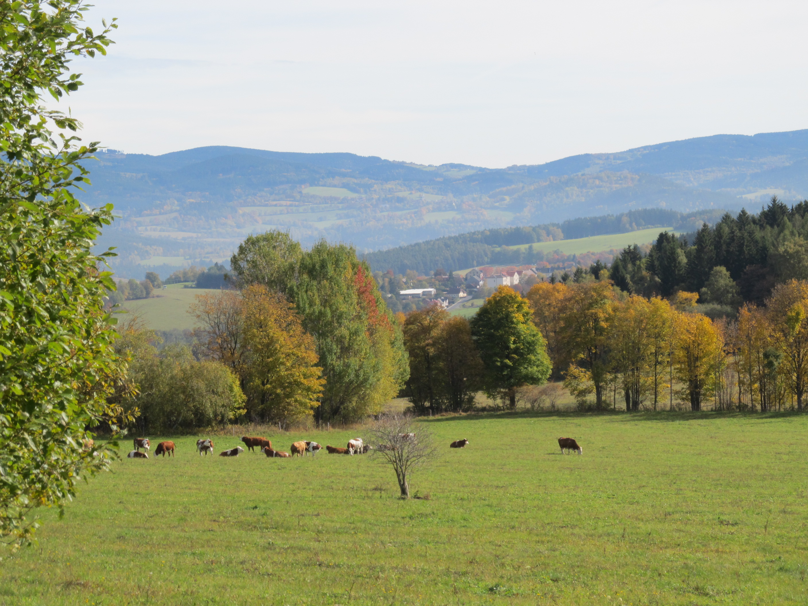 Hartmanice od Hořejšího Těšova